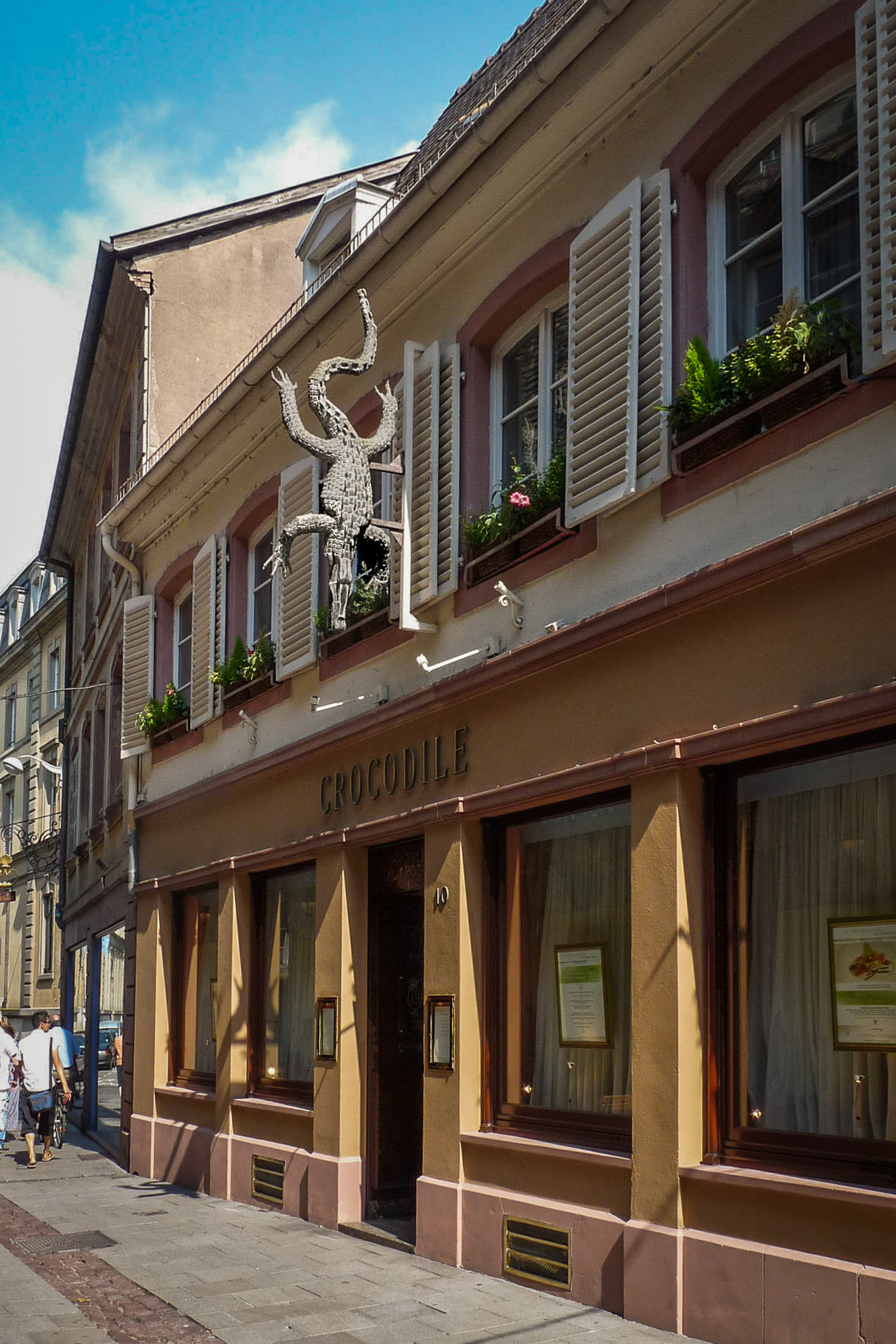 Restaurant gastronomique Au Crocodile (Strasbourg)